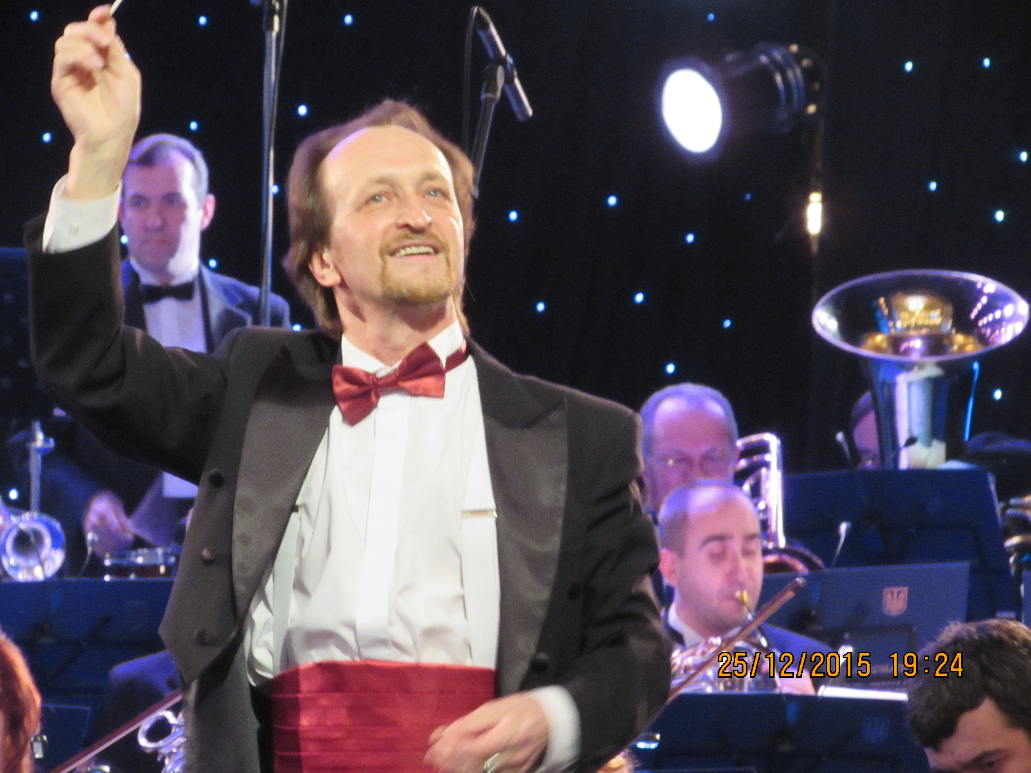 Василь Якович Василенко з Національним президентським оркестром під час ювілейного концерту, присвяченого тридцятиріччу творчої діяльності диригента. Київ, Національна музична академія України ім. П.І.Чайковського, 25 грудня 2015 року.